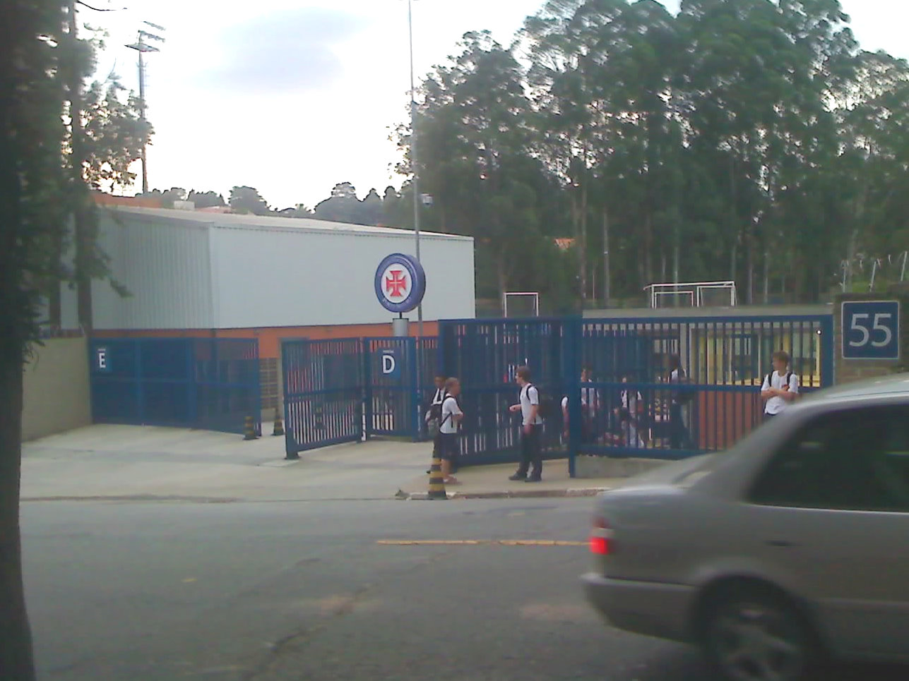 Main entrance of the Colégio Visconde de Porto Seguro, a school in São Paulo, Brazil.